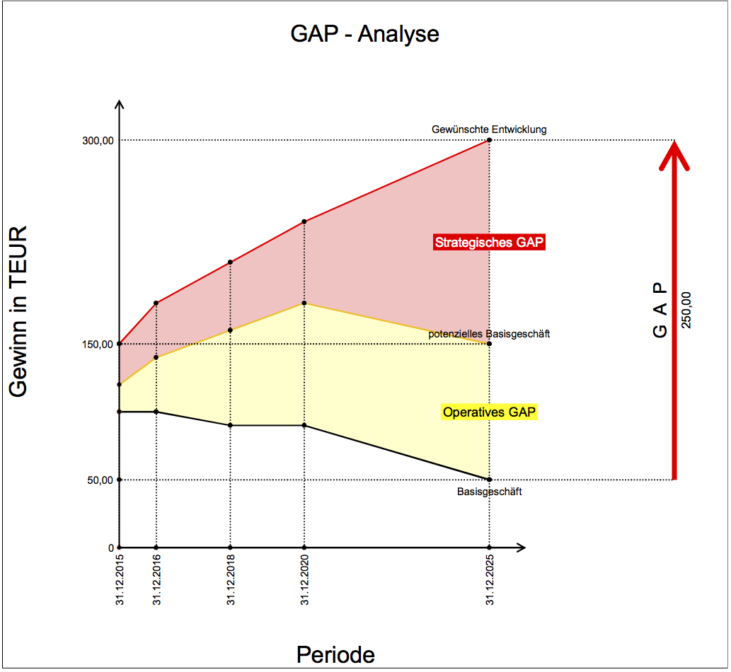 GAP-Diagramm